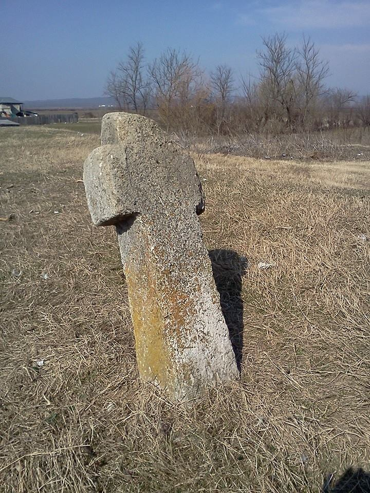 Cruce de pomenire, din piatră